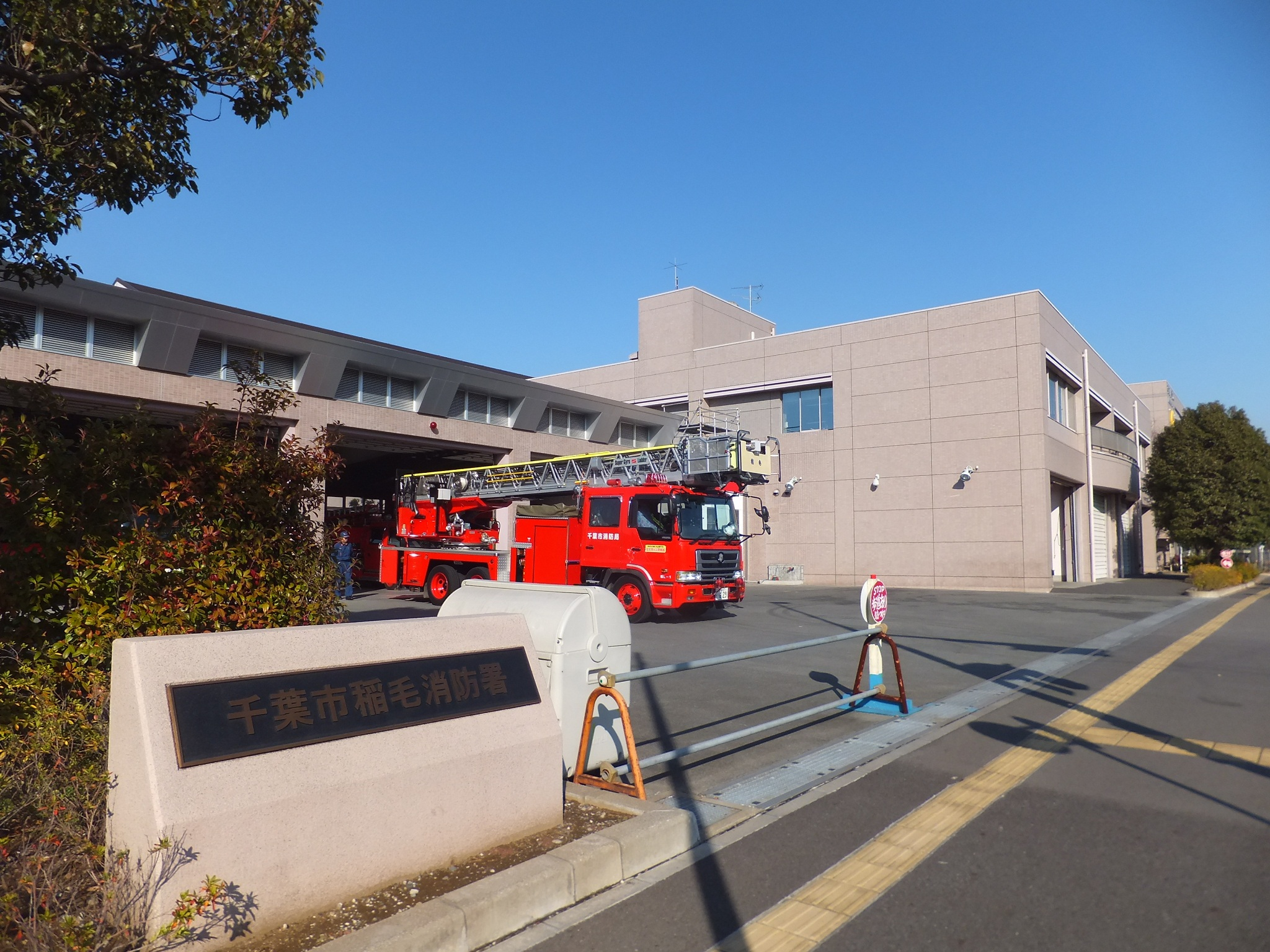 千葉市消防局、稲毛消防署